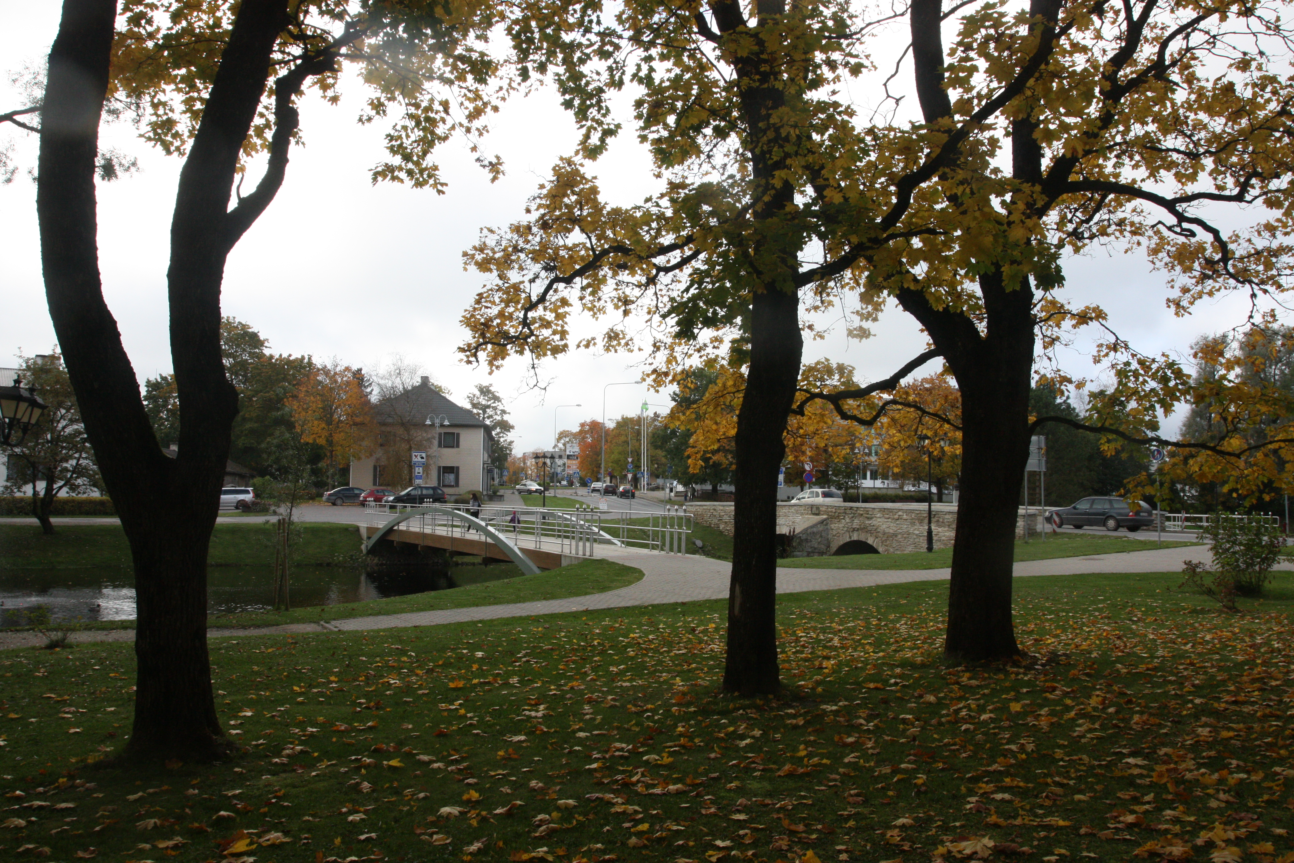 Rapla kivisild sügisel